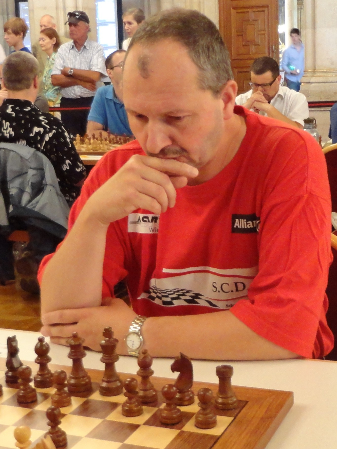 Helmut Kummer, Vienna Chess Open 2015 in Wien.